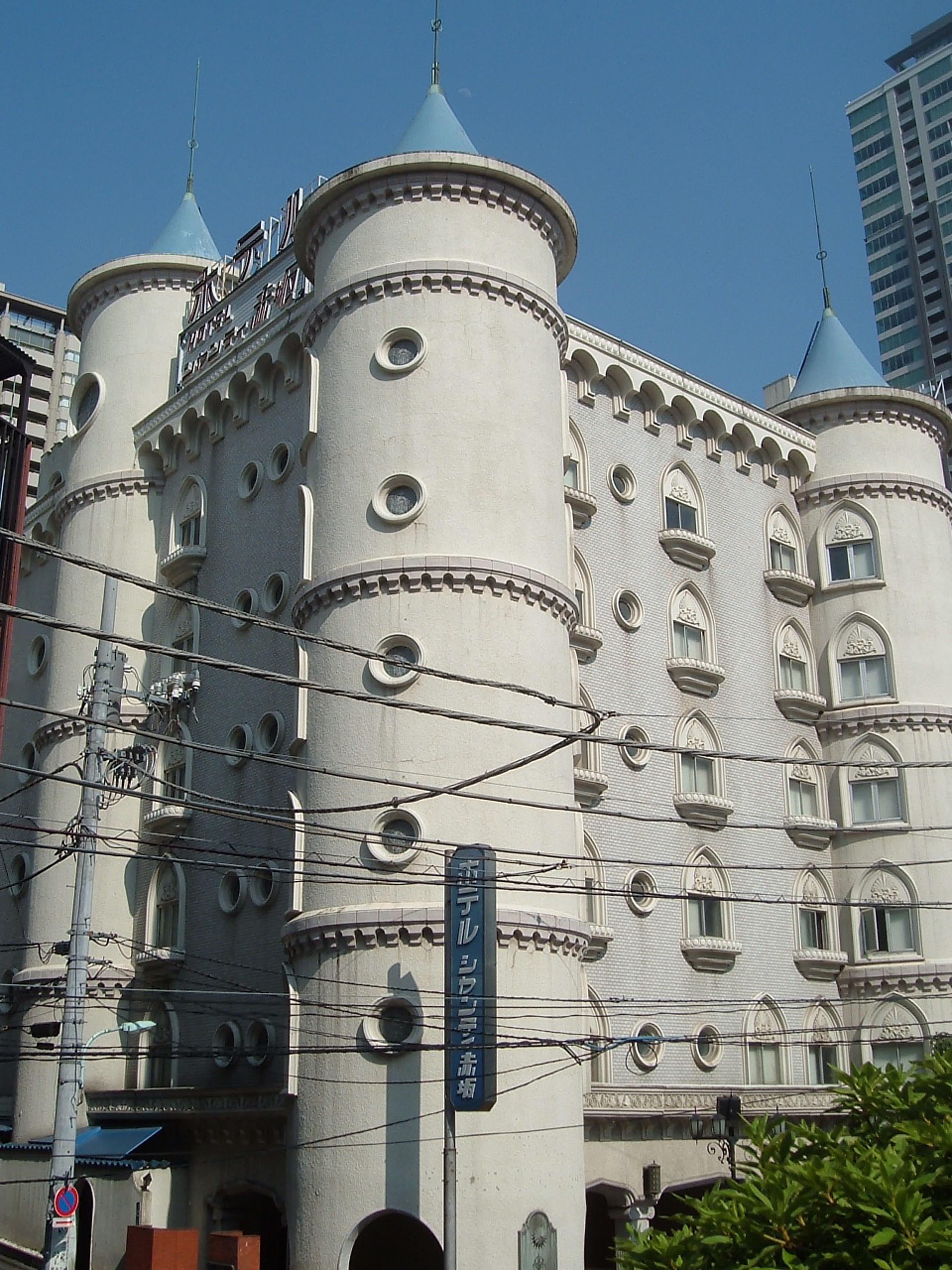 ラブホテルを象徴する外装の物件へ画像を差し替える。